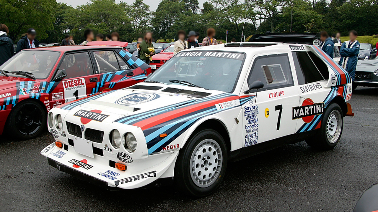 Lancia Delta S4 #209.